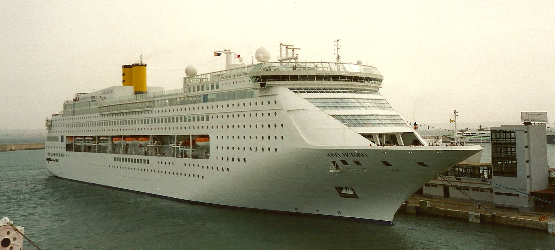 Hafen Palma de Mallorca Balearen